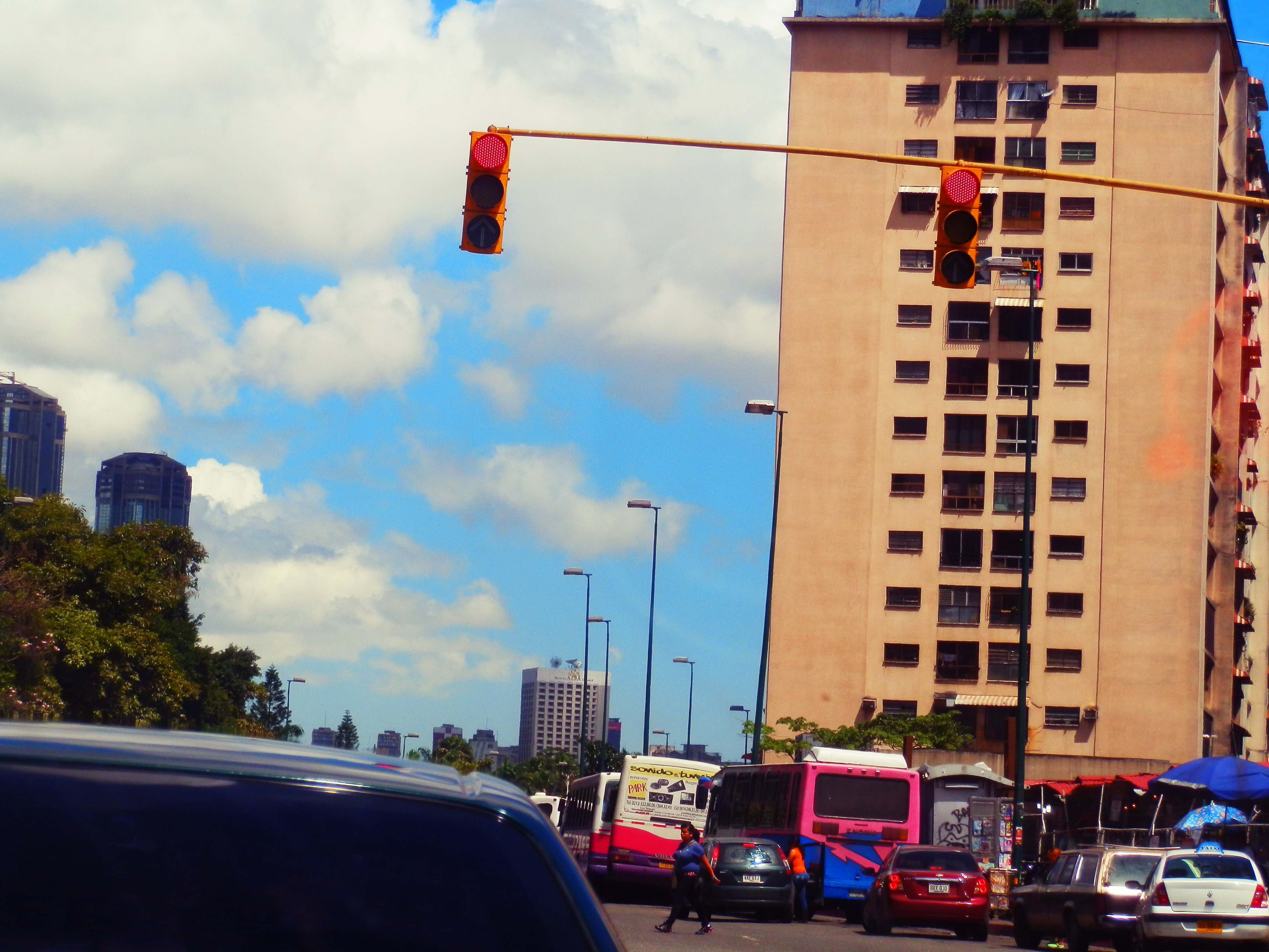 Semáforos en rojo en Caracas, Venezuela